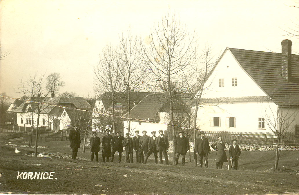 Pohlednice z Kornic, krátce po první světové válce